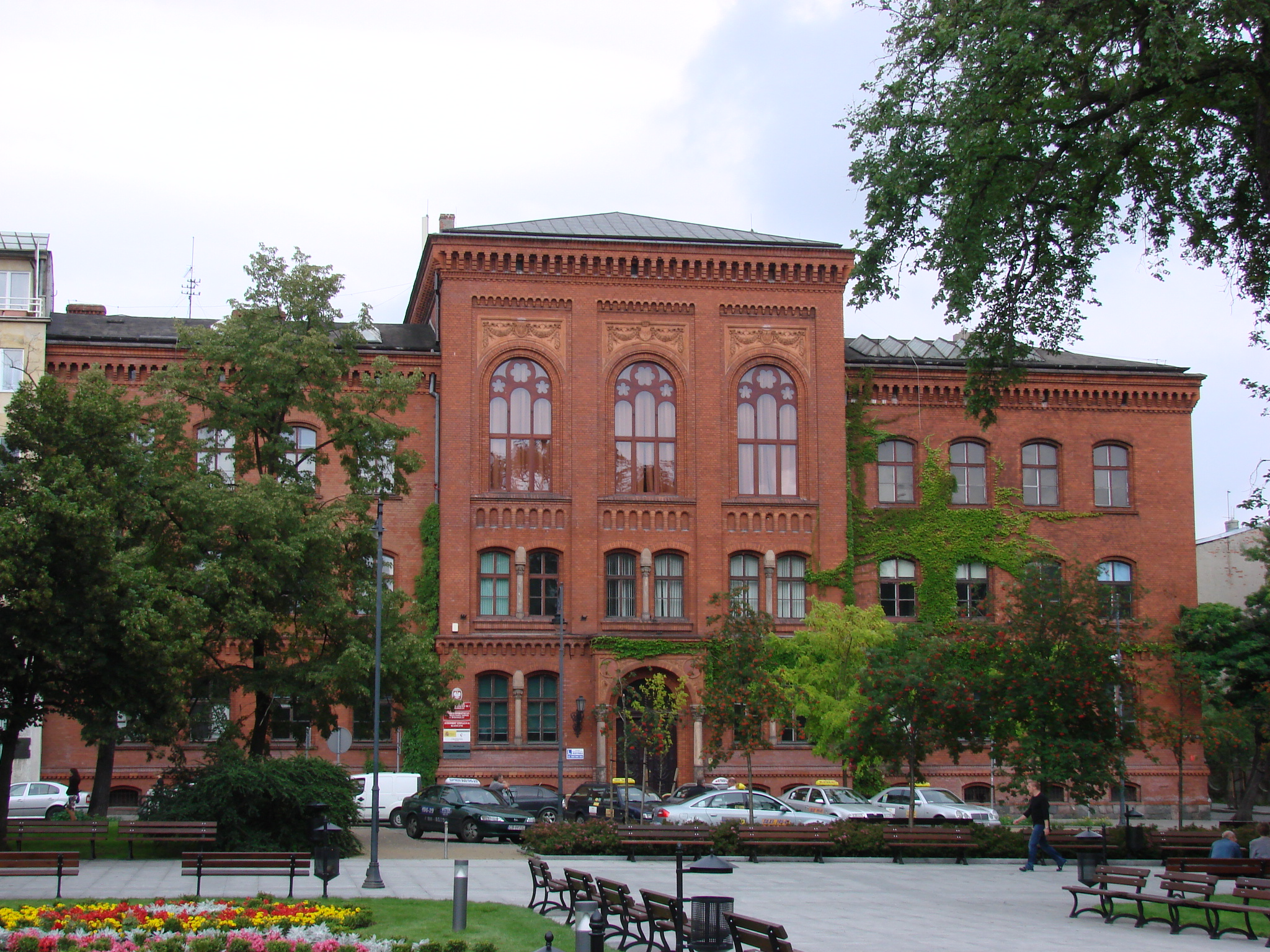 I Liceum Ogólnokształcące im. Cypriana Kamila Norwida w Bydgoszczy